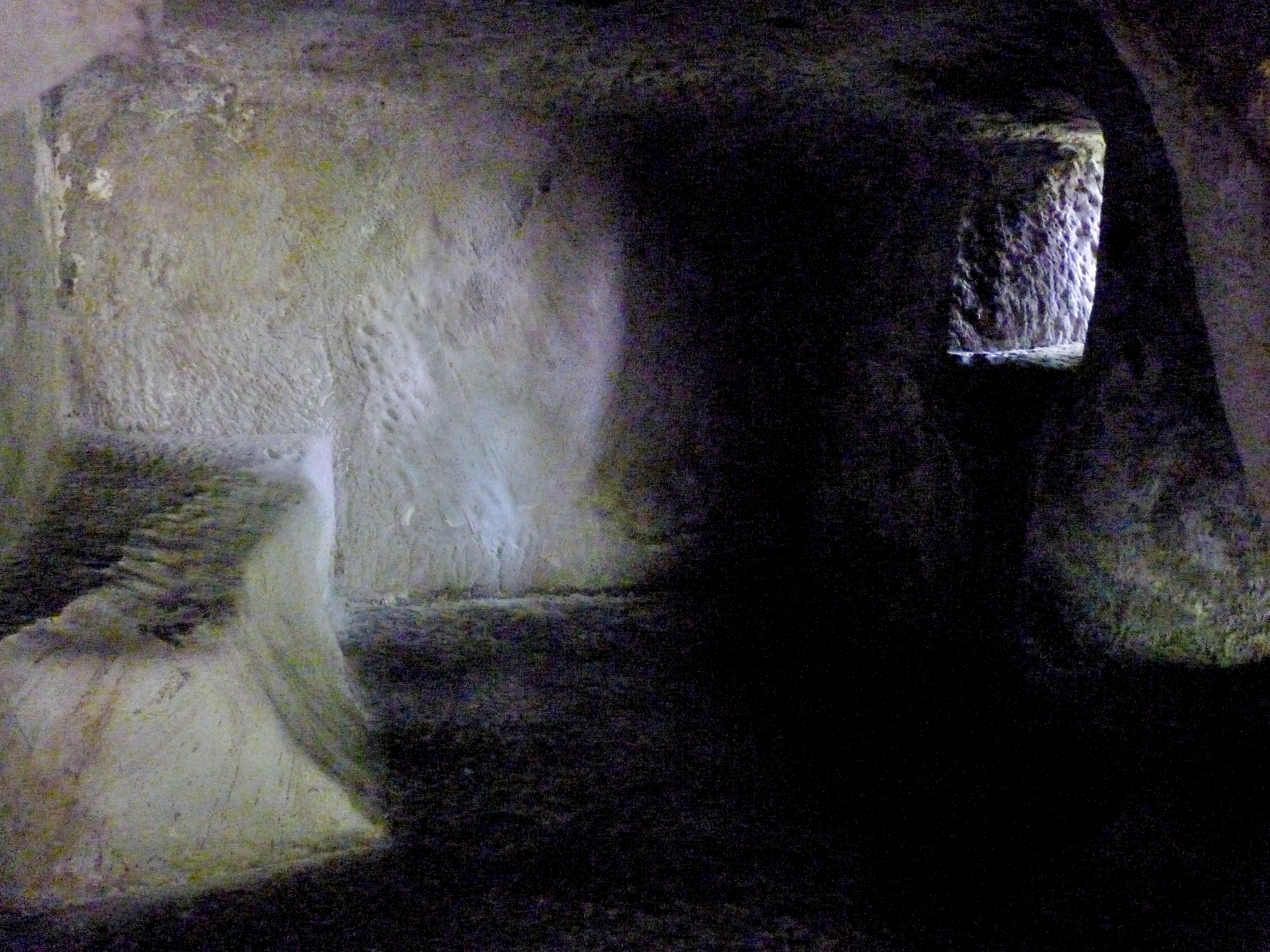 locuinta rupestra de la Alunis